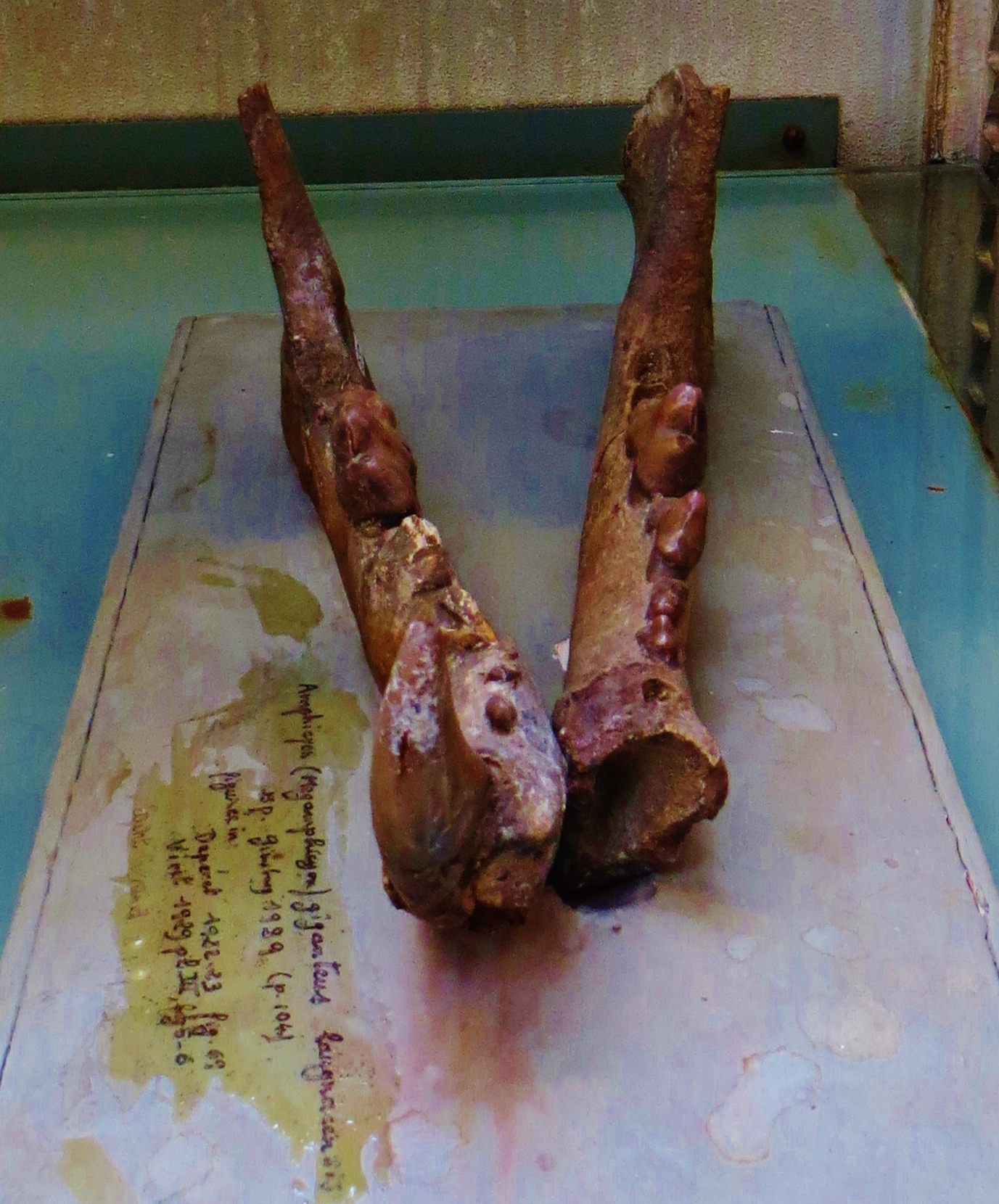 Fossil of Amphicyon, an extinct mammal - Took the photo at Museum Histoire Naturelle, Paris